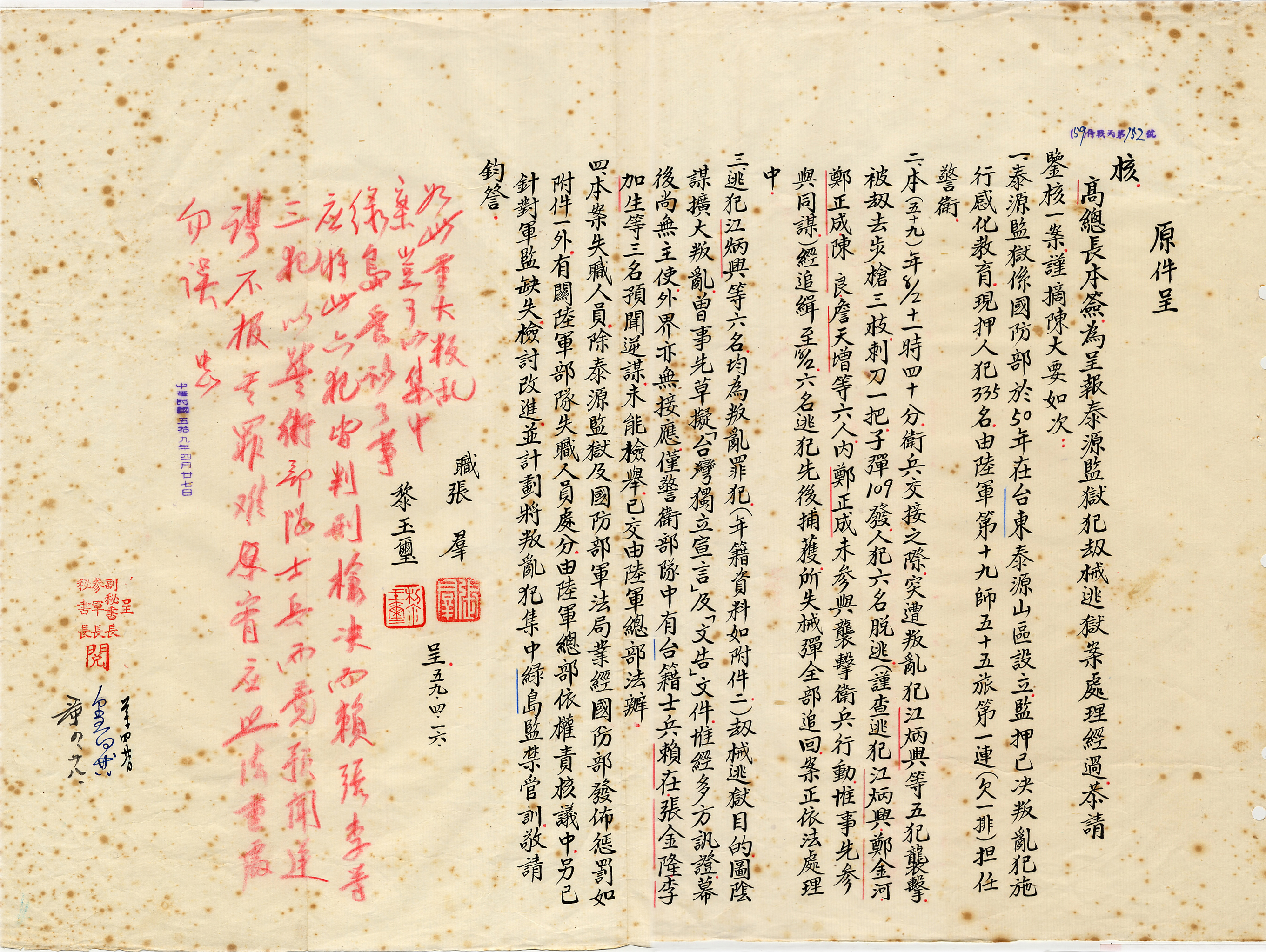 中華民國59年4月16日，一份由當年總統府秘書長張羣和參軍長黎玉璽呈給總統蔣中正的公文，主要是呈報關於泰源監獄囚犯劫械逃獄處理過程。文末，蔣中正親批紅字：「如此重大叛亂案，豈可以集中綠島管理了事，應將此六犯判刑槍決。而賴張李等三犯，以警衛部隊士兵，而竟預聞逆謬不報，其罪難宥，應照法重處，勿誤。中正。」